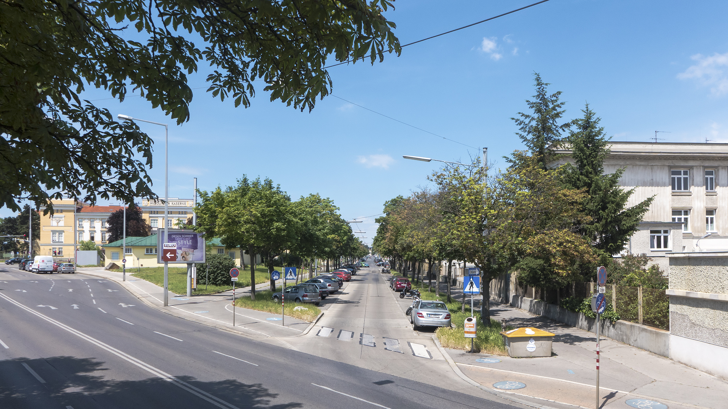 Hohenbergstraße in Wien 12 bei der Edelsinnstraße Richtung Westen